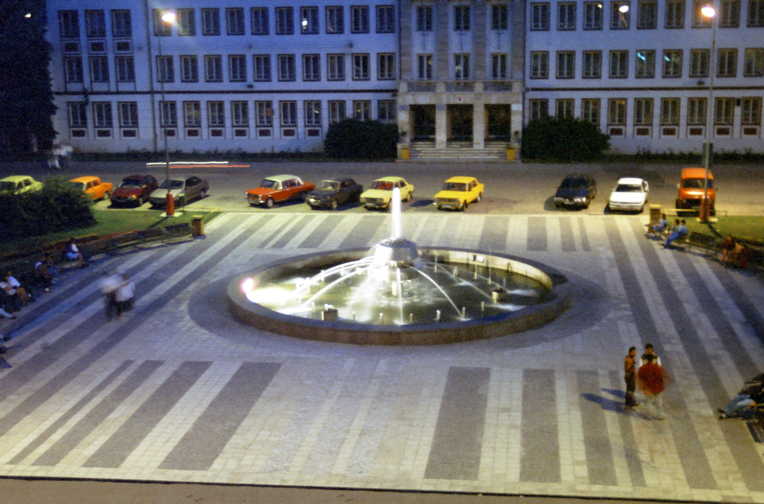 Partizánske Markt